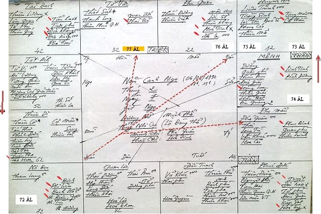 TuviDQH